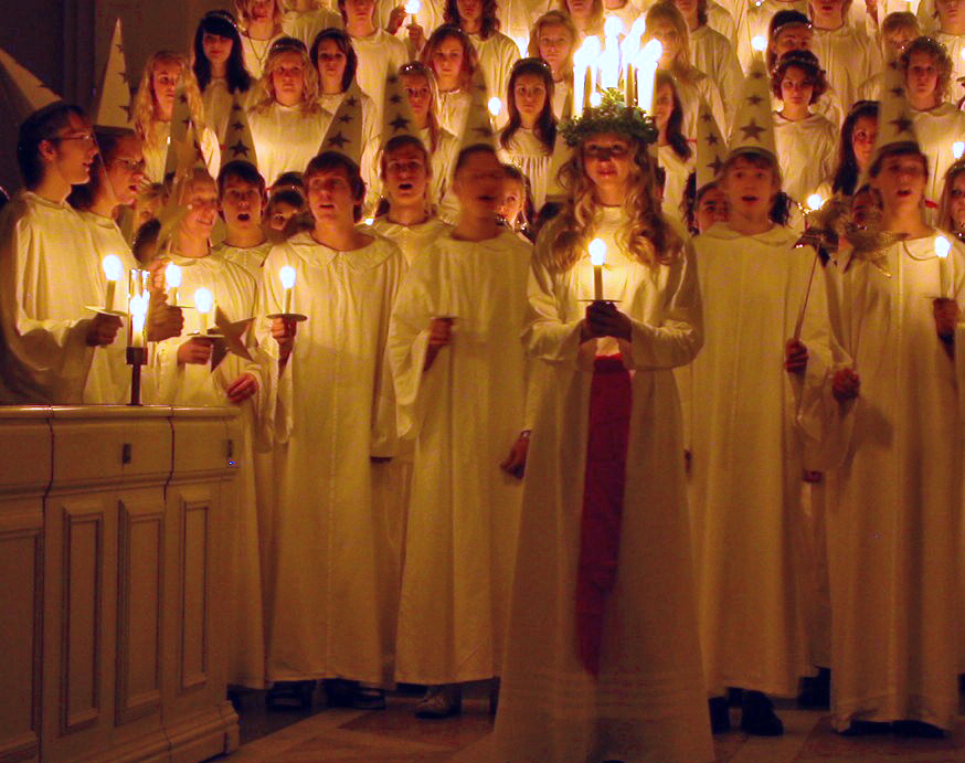 Luciafeier in einer schwedischen Kirche